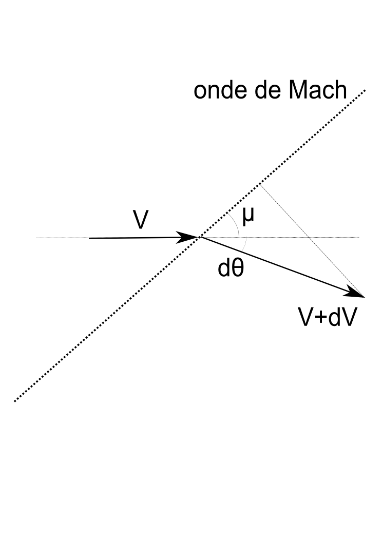 Schéma de calcul pour une détente élémentaire.